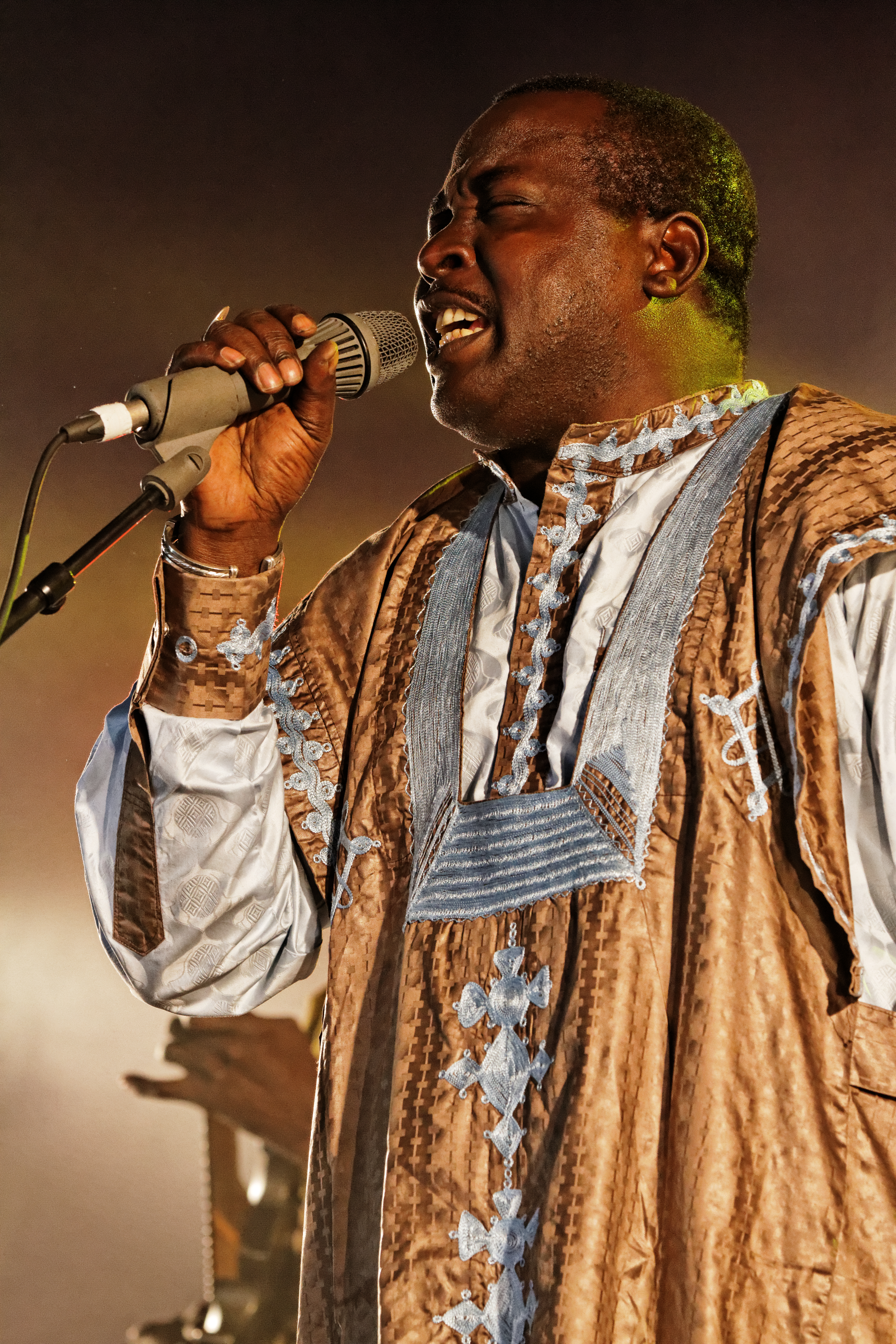 Mamar Kassey en concert sur la scène Cabaret lors du festival du bout du Monde à Crozon dans le Finistère (France).